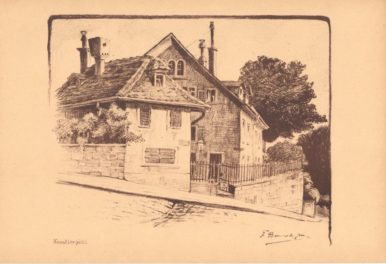 Lithographie aus "Malerische Winkel" 20x30 cm